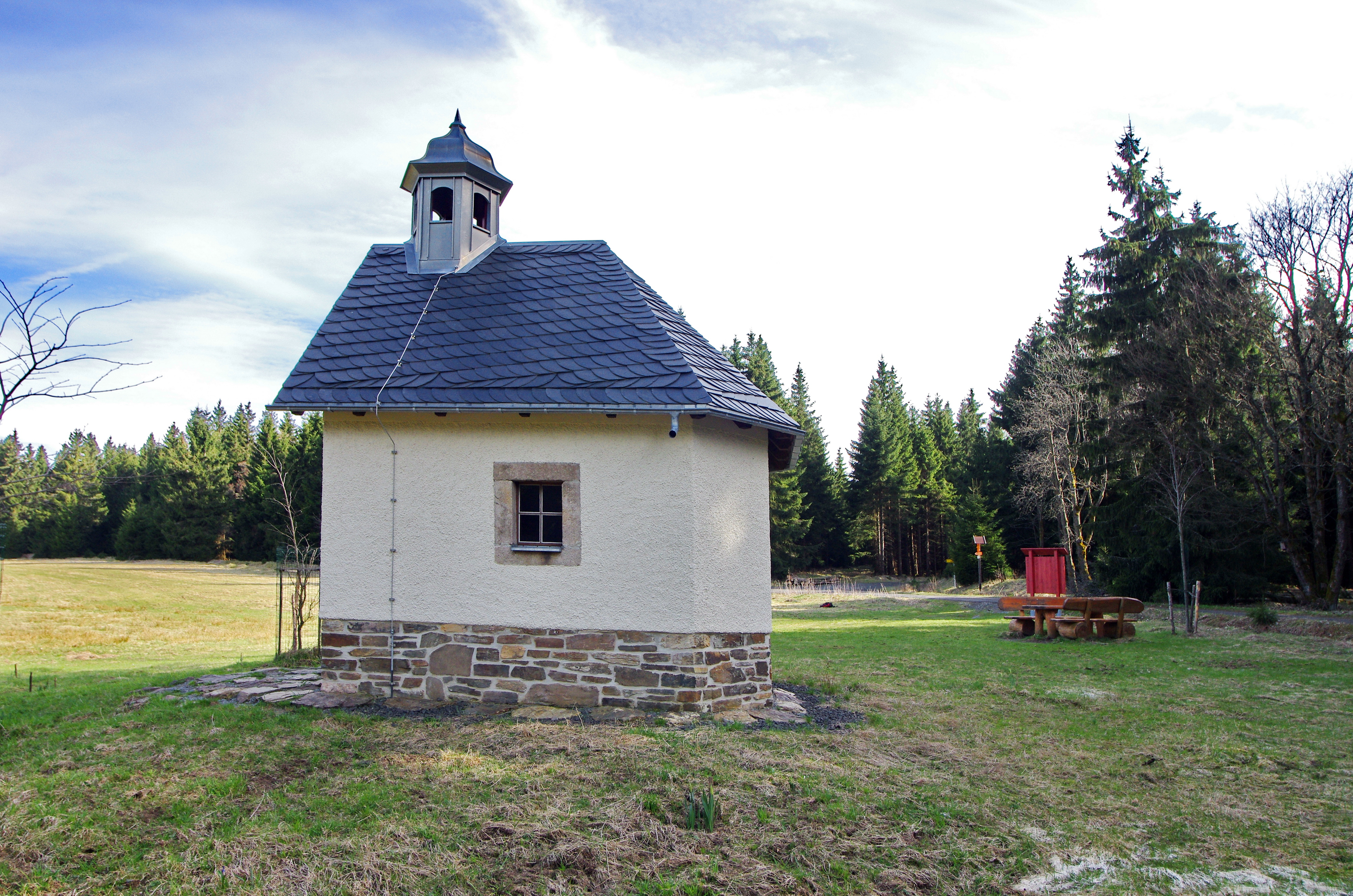 Mílov zaniklá osada (Boží Dar) na česko-německé hranici; nově postavená kaple sv. Jana Nepumuckého, Krušné hory, okres Karlovy Vary